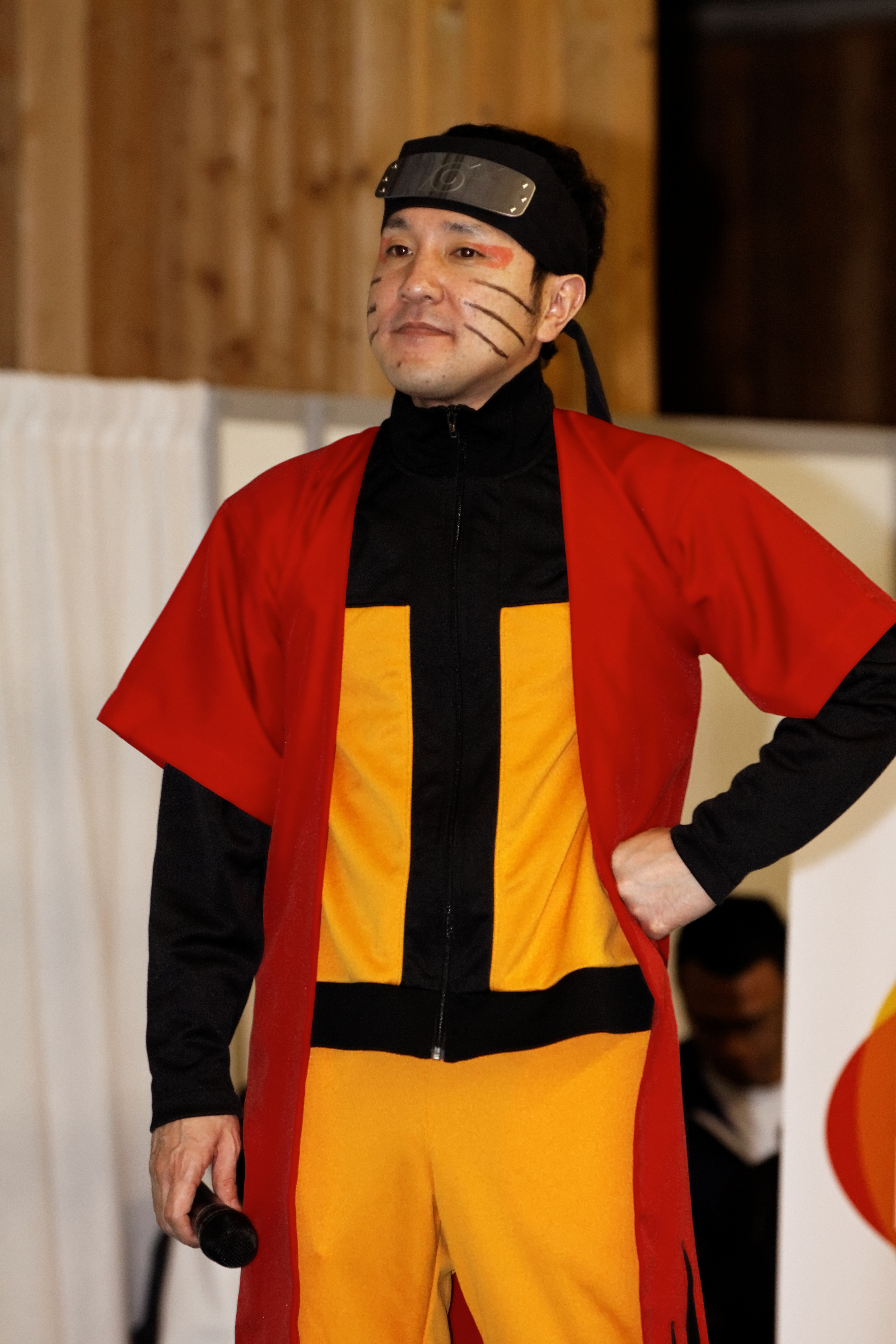 Hiroshi Matsuyama